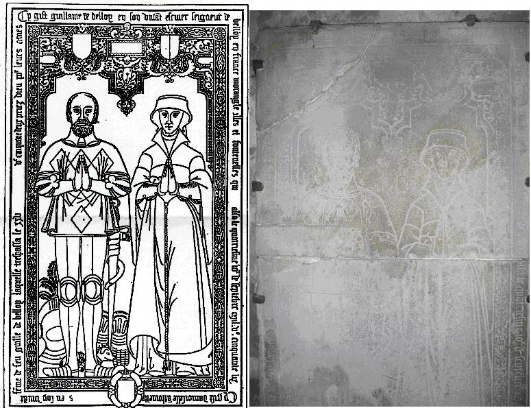 franais: dalle funéraire de guillaume de belloy dans l'eglise de belloy en france. english: guillaume de belloy funeral dalle's in belloy en france church's